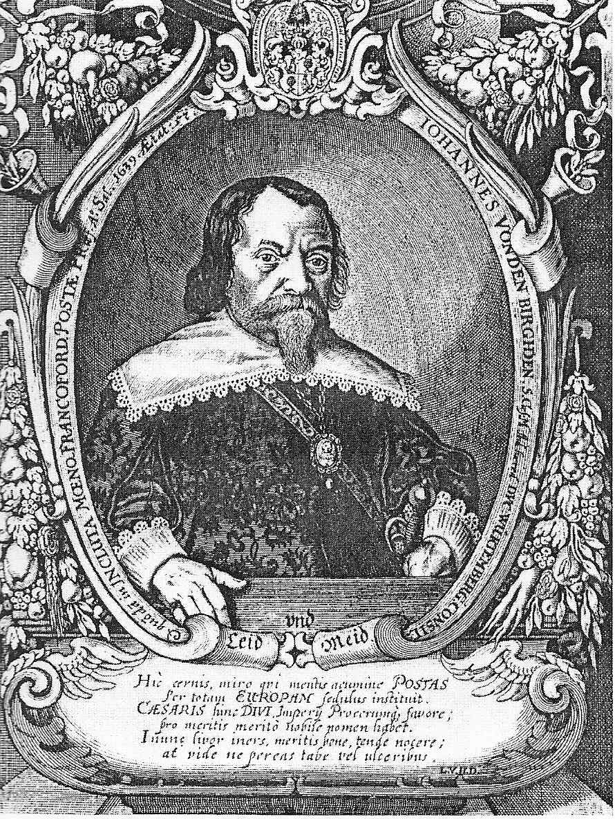 Portrait Johann von den Birghden 1639